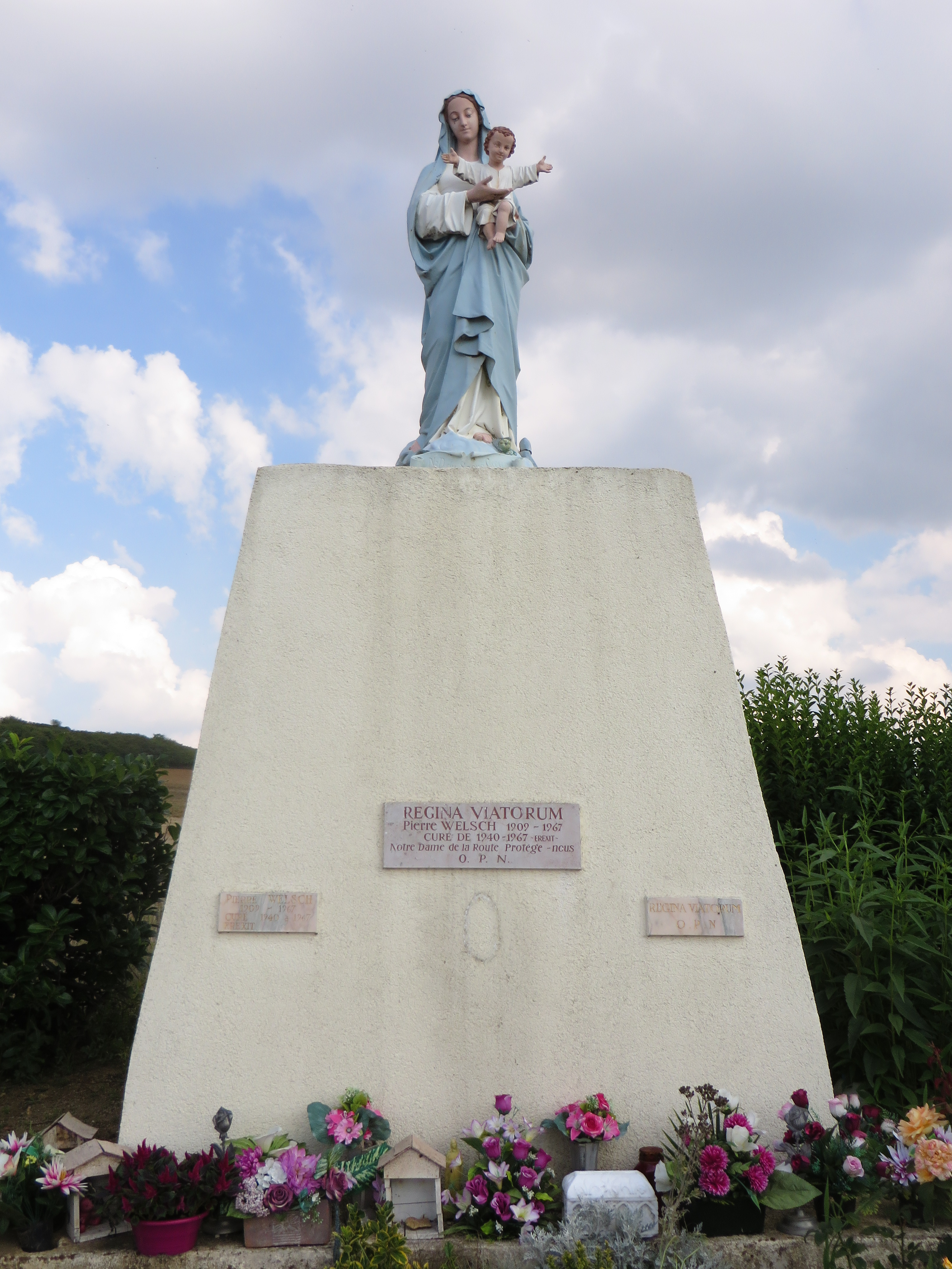 Moncheux statue vierge